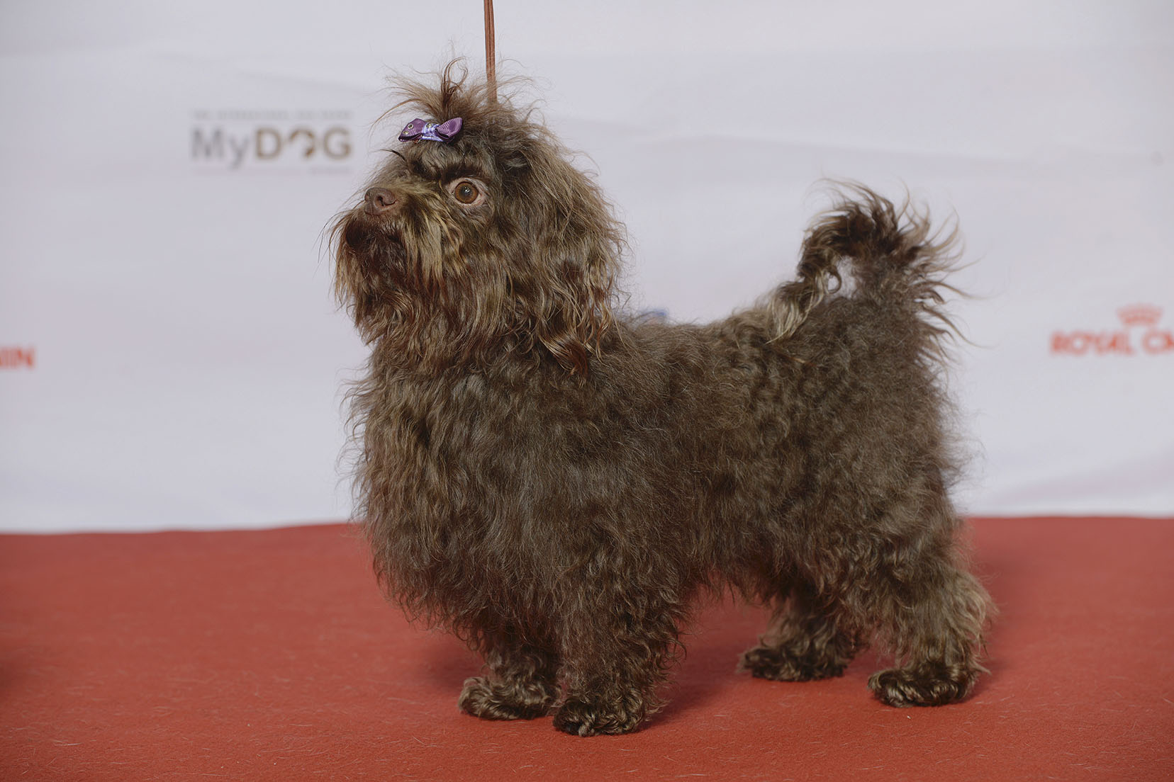 RUSSKAYA TSVETNAYA BOLONKA, Rayskoe Sotsvetie Tsevtik MyDOG, Nordens största hundevenemang